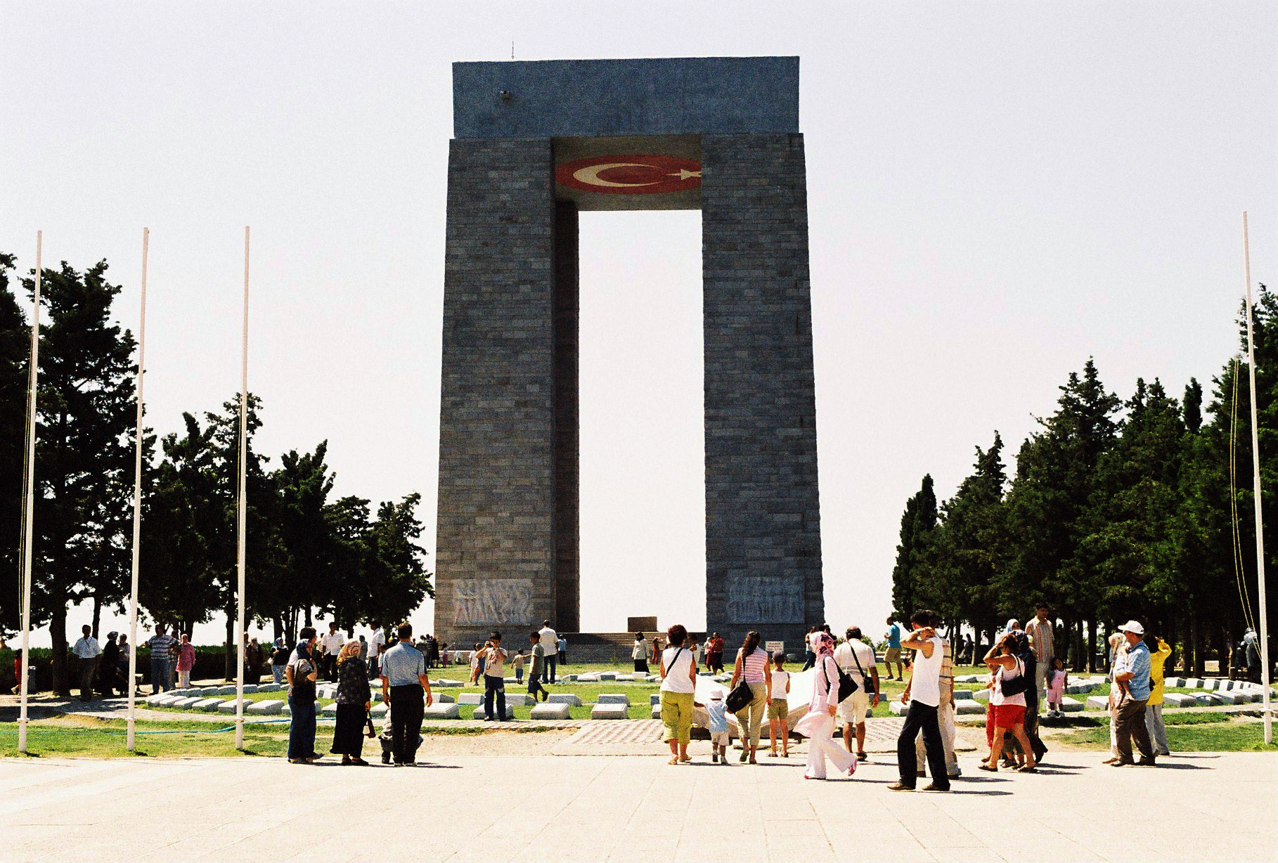 Çanakkale Abide